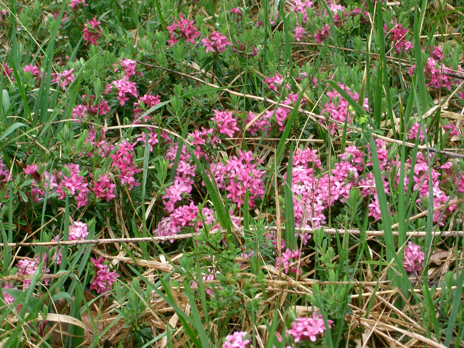 daphné camélée sur le plateau jurassien - Loulle (39) - 29 avril 2007 (Daphne cneorum)